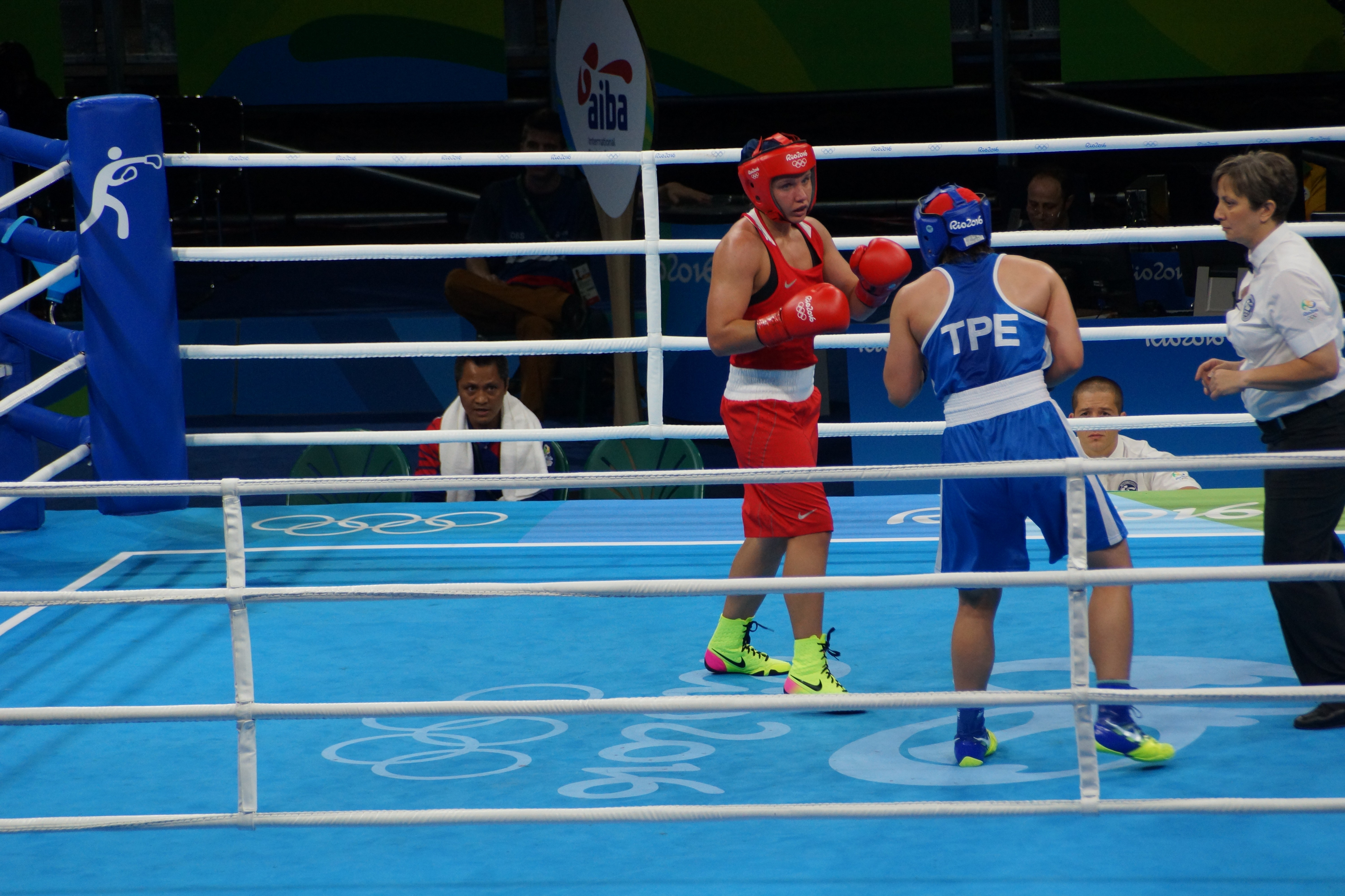 slt.a-77